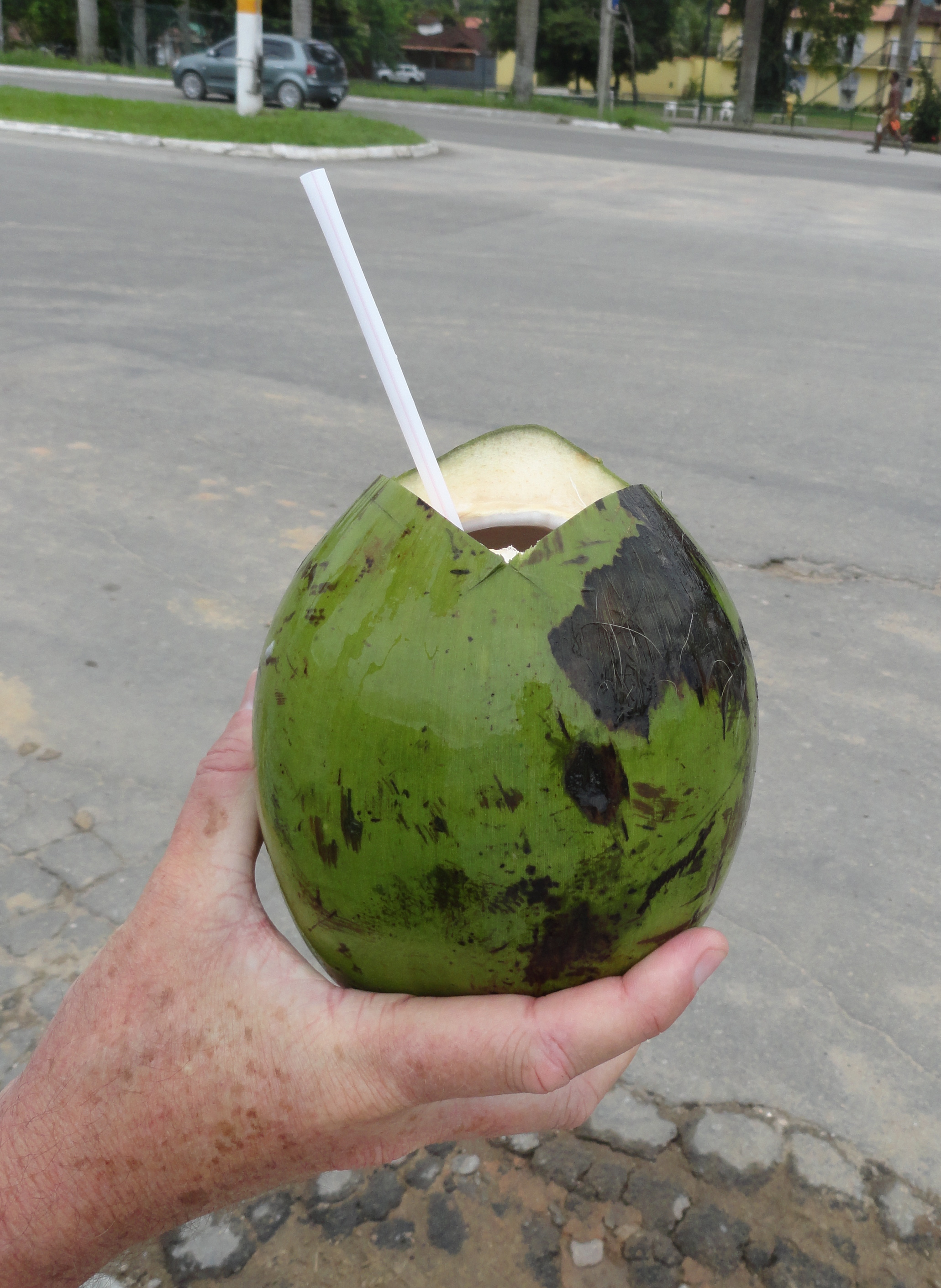 frische Kokosnuss als Drink